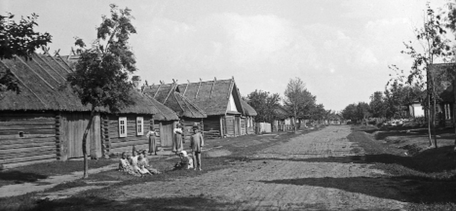 Деревня Куровицы.